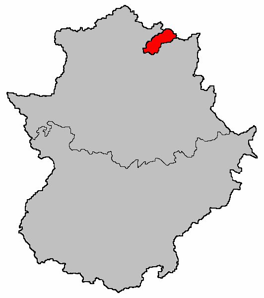 Mapa de situación de la comarca del Valle del Jerte en Extremadura